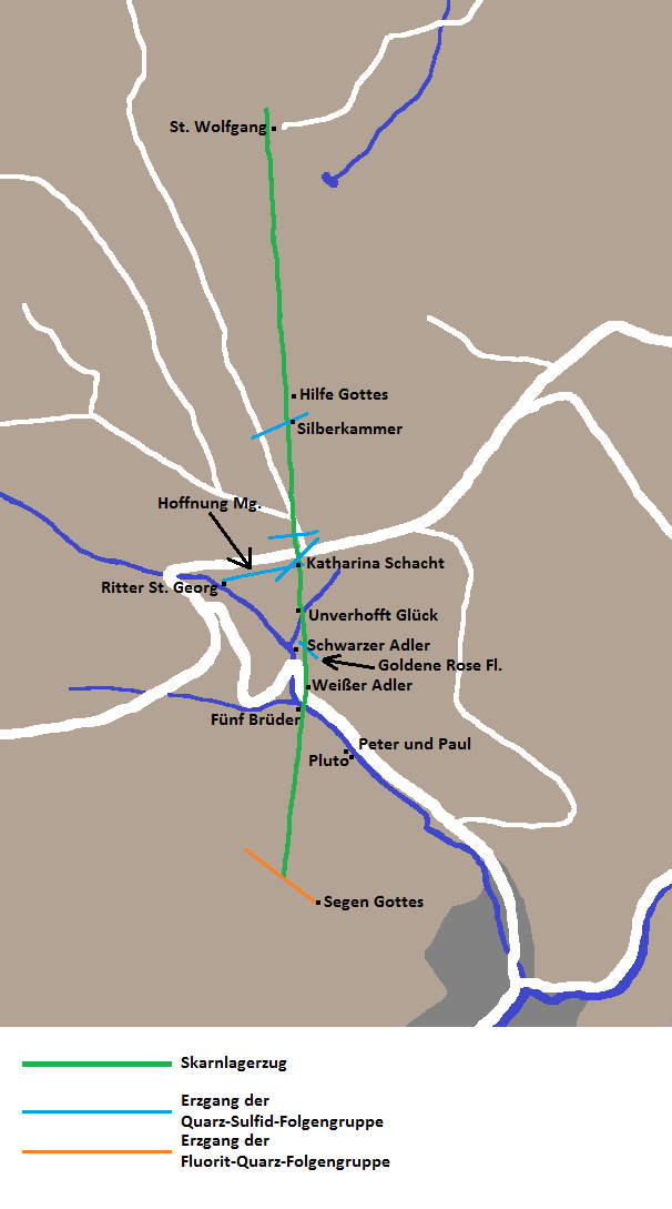 Schematische Karte der Erzlager bei Unverhofft Glück An der Achte; nach Geologische Karte des Freistaates Sachsen Blatt 5442 Aue / Freiberg 2009